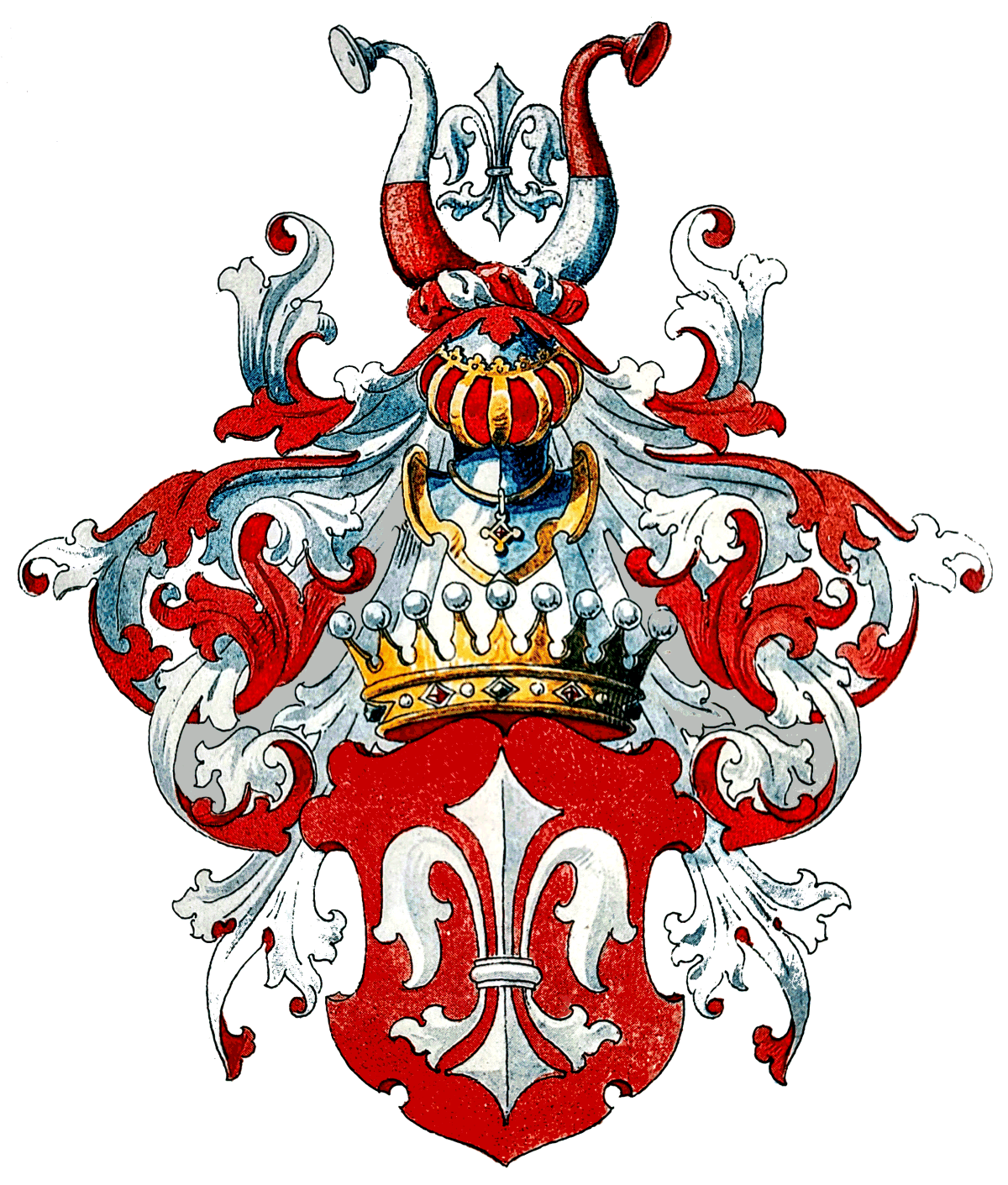 Wappen Graf von Schack